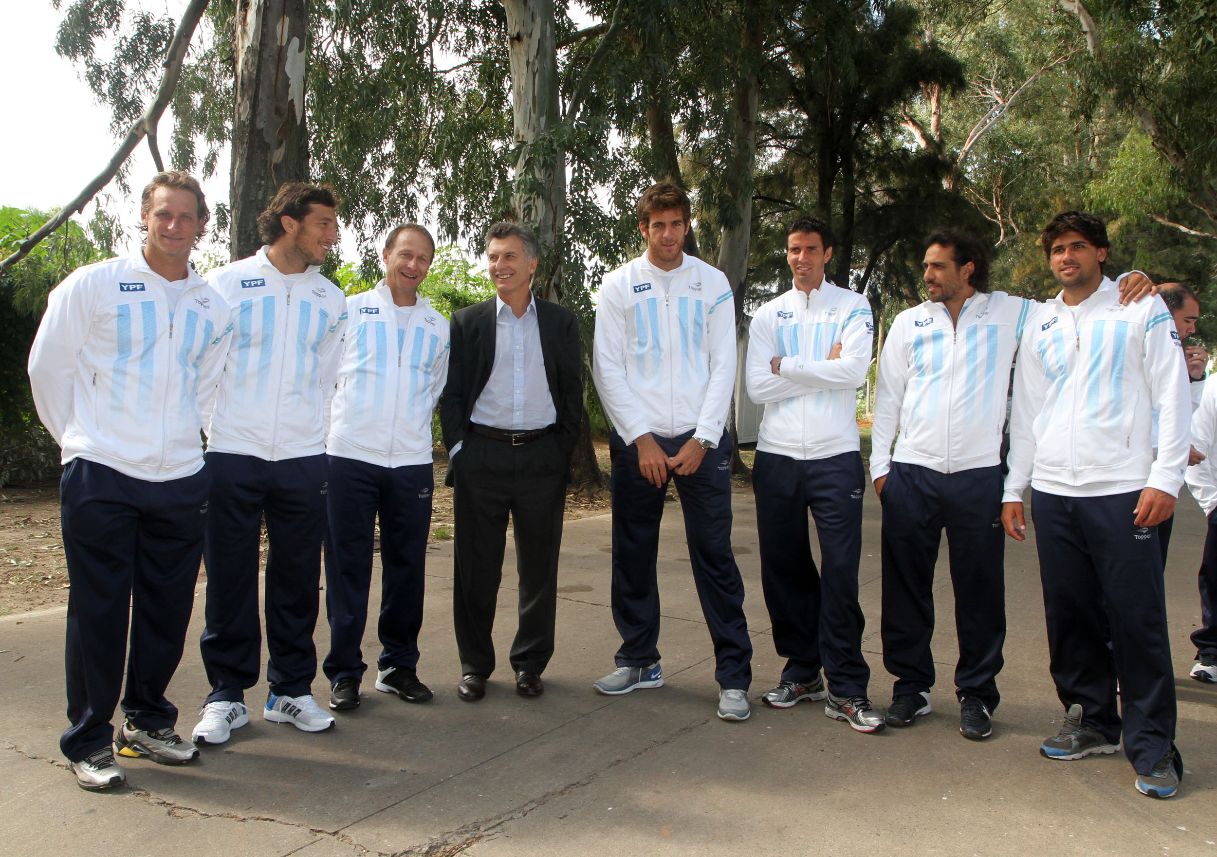 Buenos Aires, 03 de abril de 2012. EL jefe de gobierno de la Ciudad de Buenos Aires, Mauricio Macri, saludo hoy a los integrantes del Equipo Argentino de la Copa Davis que este fin de semana jugaran contra Croacia. Fotos: Sandra Hernandez/GCBA